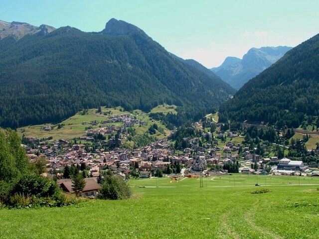 Panorama del paese di Moena, fotografato da ovest